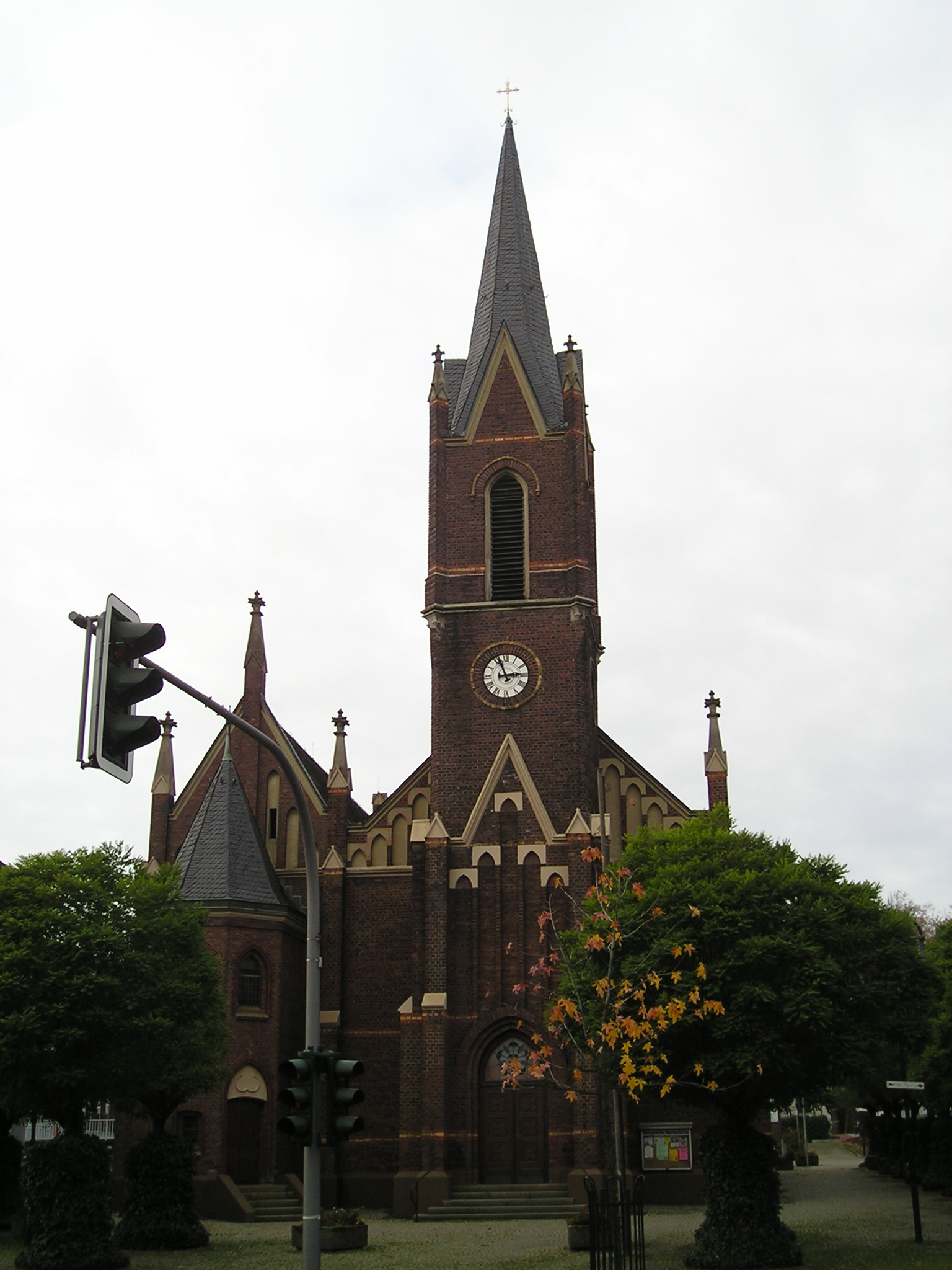 Evangelische Martinskirche in Bottrop